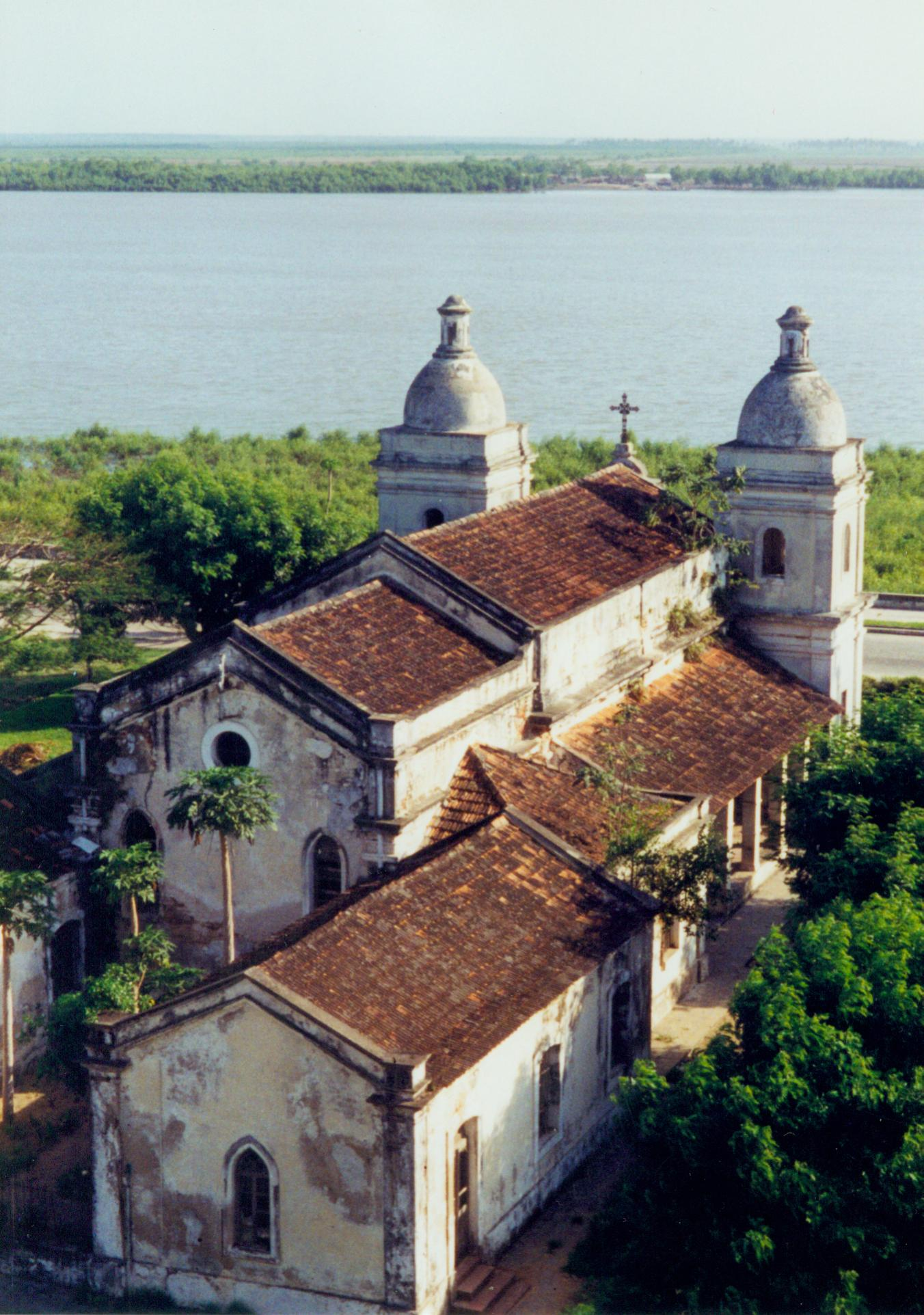 L'antica cattedrale di Quelimane / The old cathedral of Quelimane, Mozambique